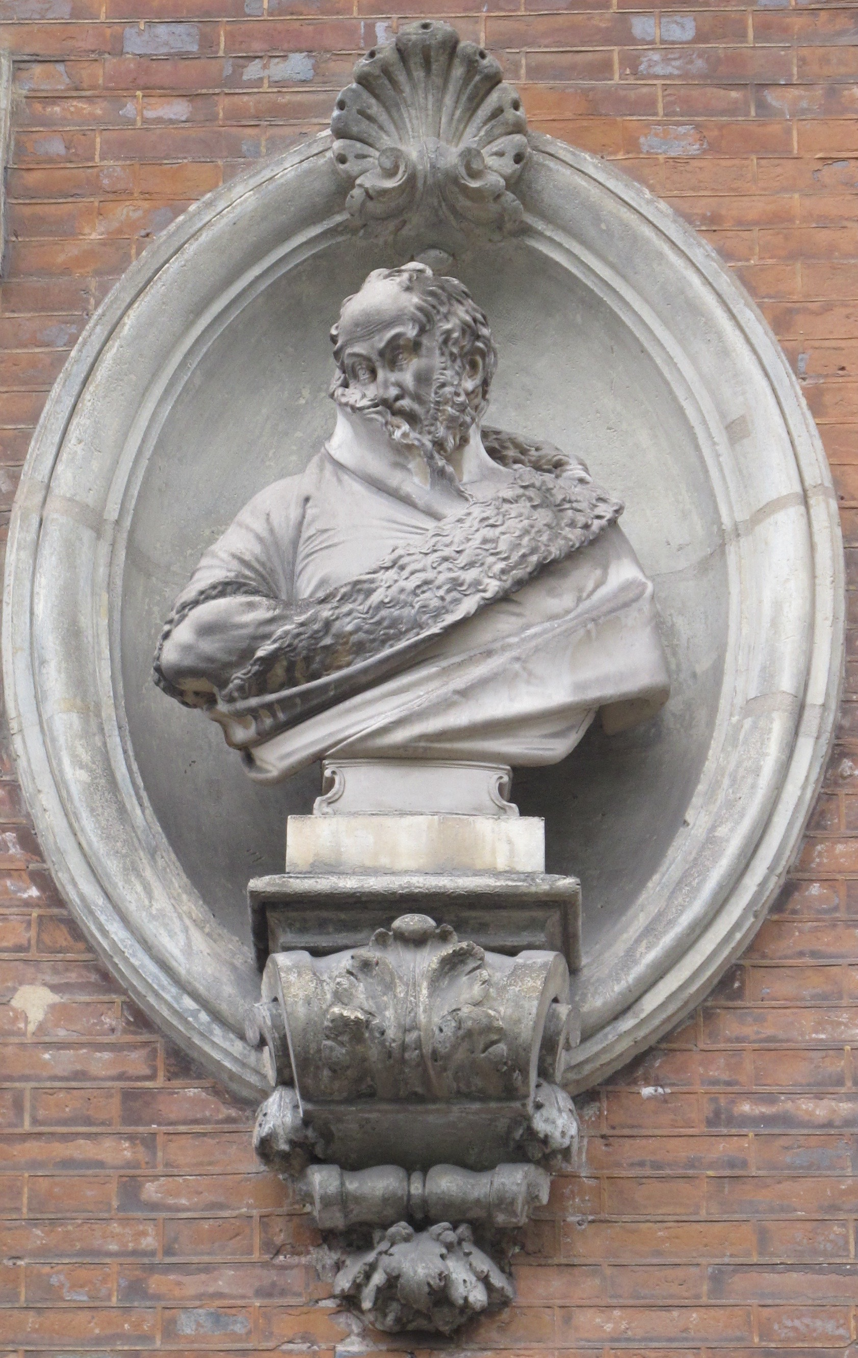 Statue au n°3 rue Le Nôtre (Paris, 16e).